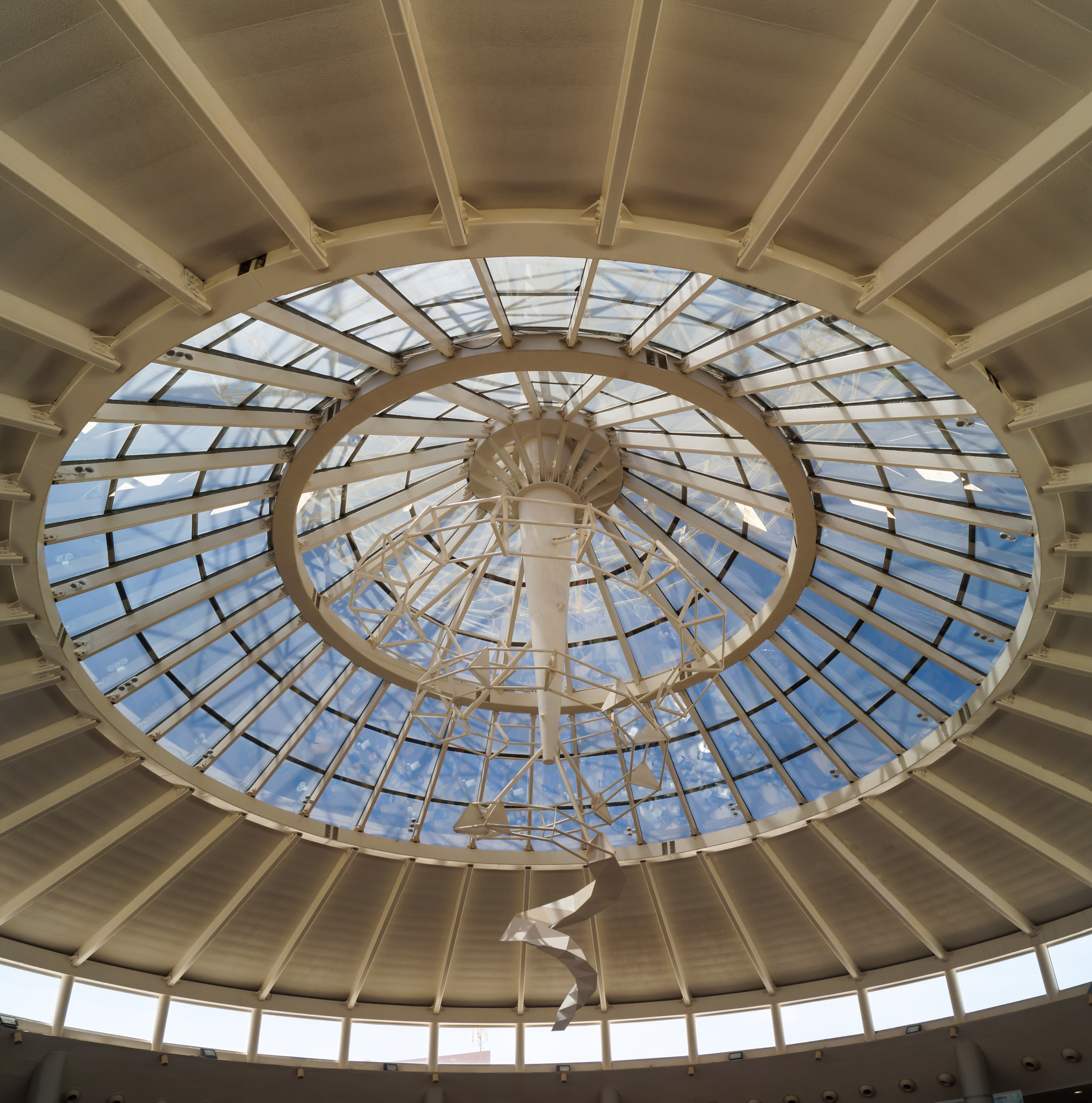 Interuior de la Cúpula del Sambil Paraguana. Estado Falcón. Venezuela.